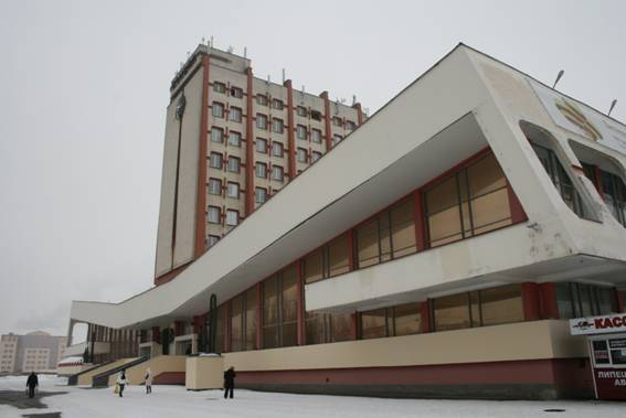 Липецк, вокзал